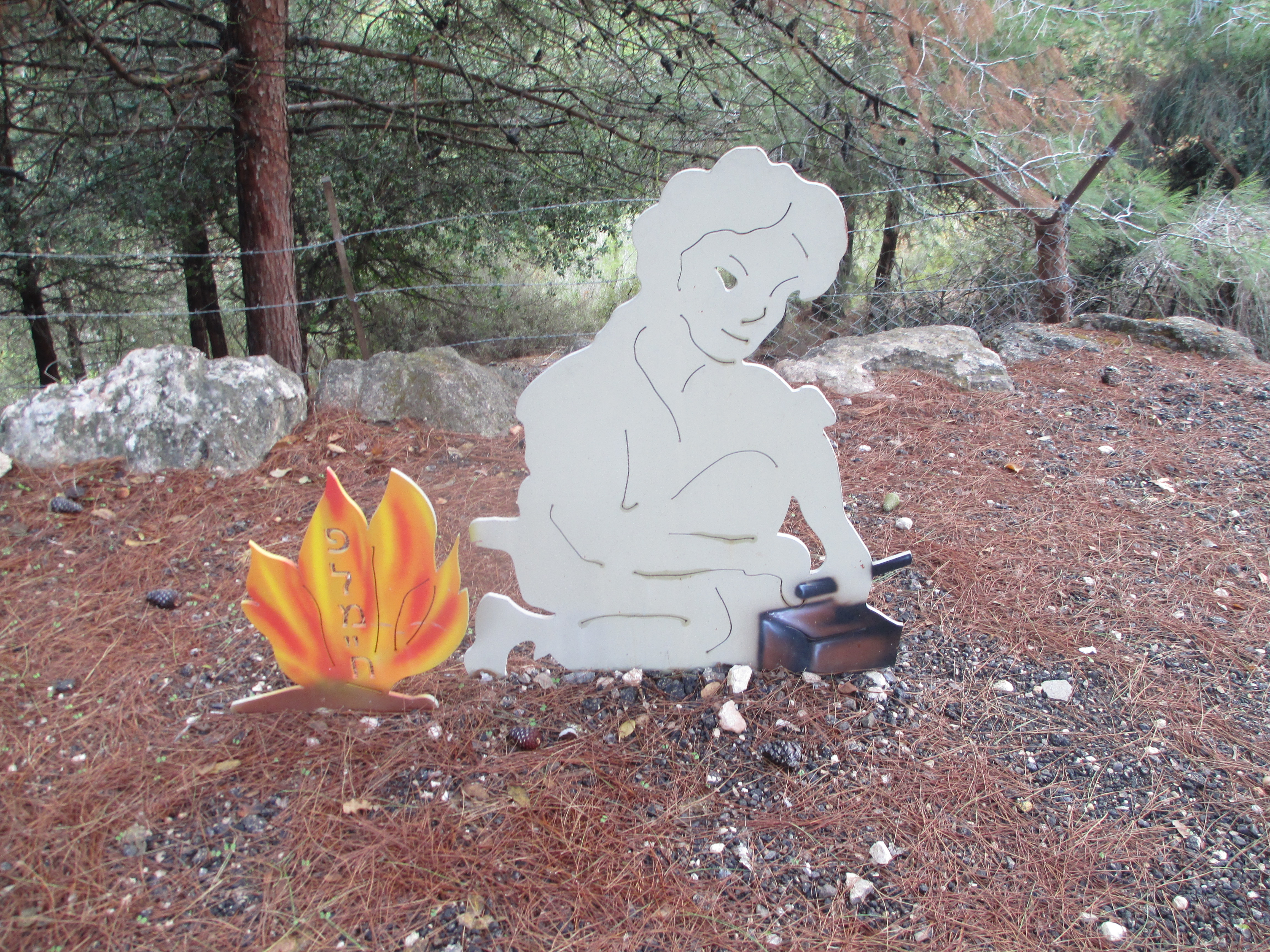 פסל מדורות הפלמ"ח - מחלקת החבלה